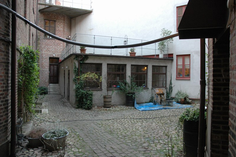 Gårdshus, Kvarteret Skutan, till vänster syns gårdsfasaden till Linnégatan 1, till höger anas tegelfasaden till andra långgatan 2. Den putsade fasaden bakom gårdshuset tillhör grannfastigheten hus.